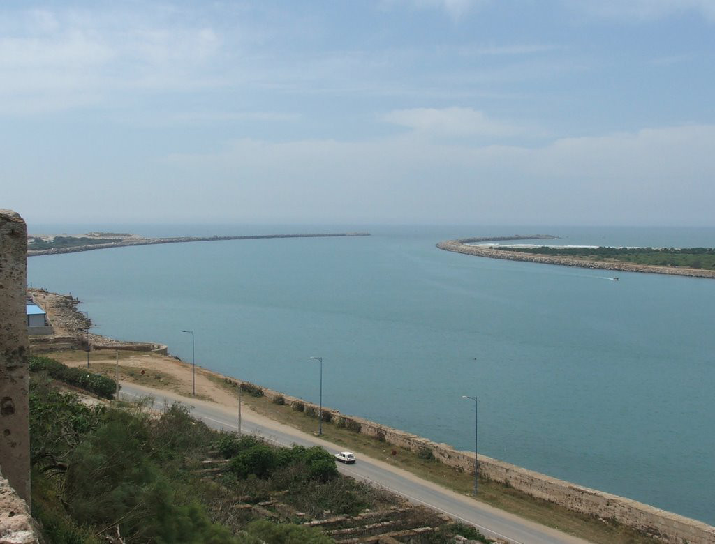 Desembocadura del río Sebú desde la alcazaba de Mehdia